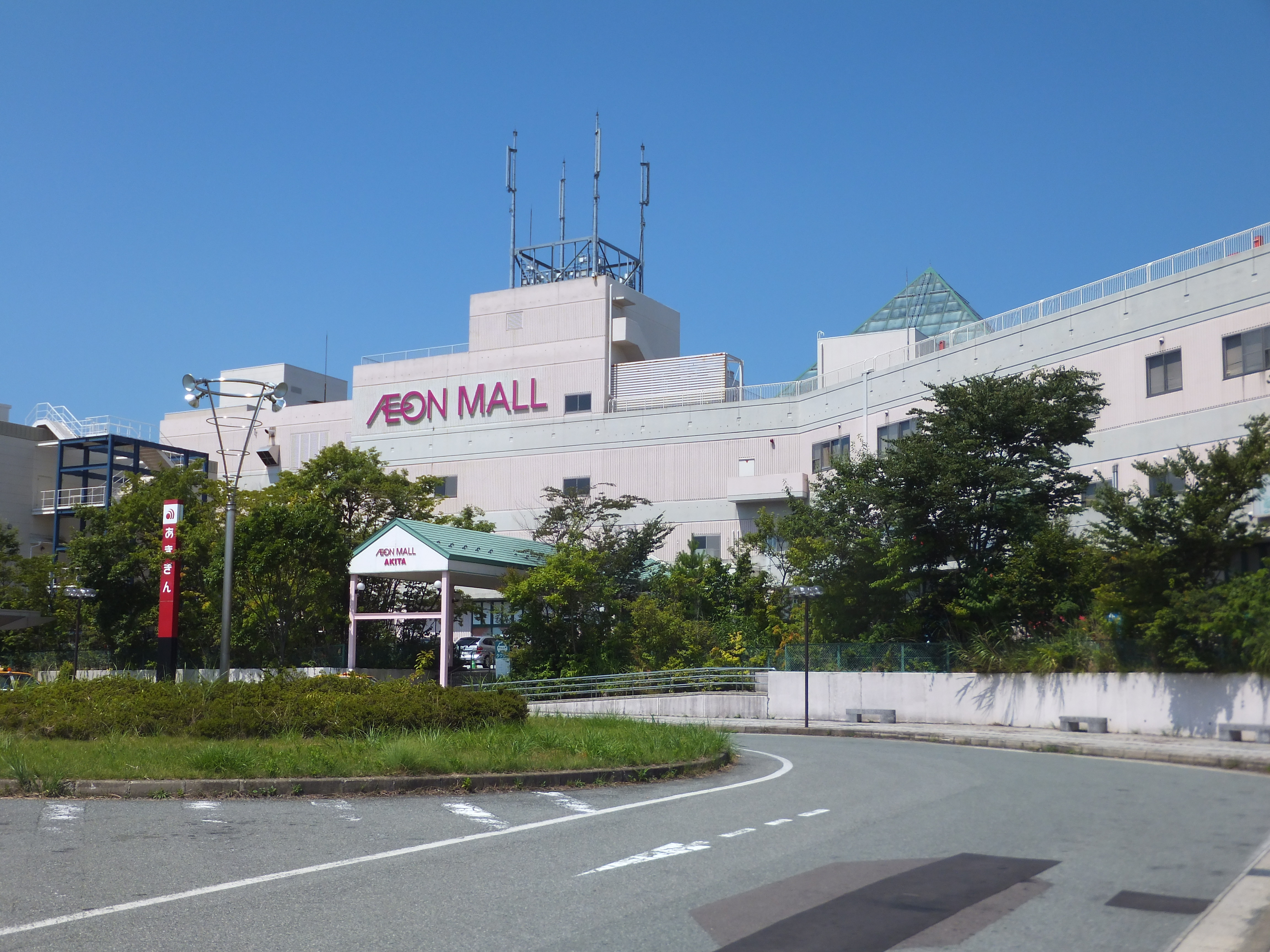 イオンモール秋田、南側バスロータリー。秋田銀行御所野支店も面している。